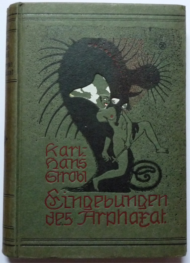 Karl Hans Strobl - Die Eingebungen des Arphaxat, Originalausgabe 1904, Verlag Bruns, Minden i. W.